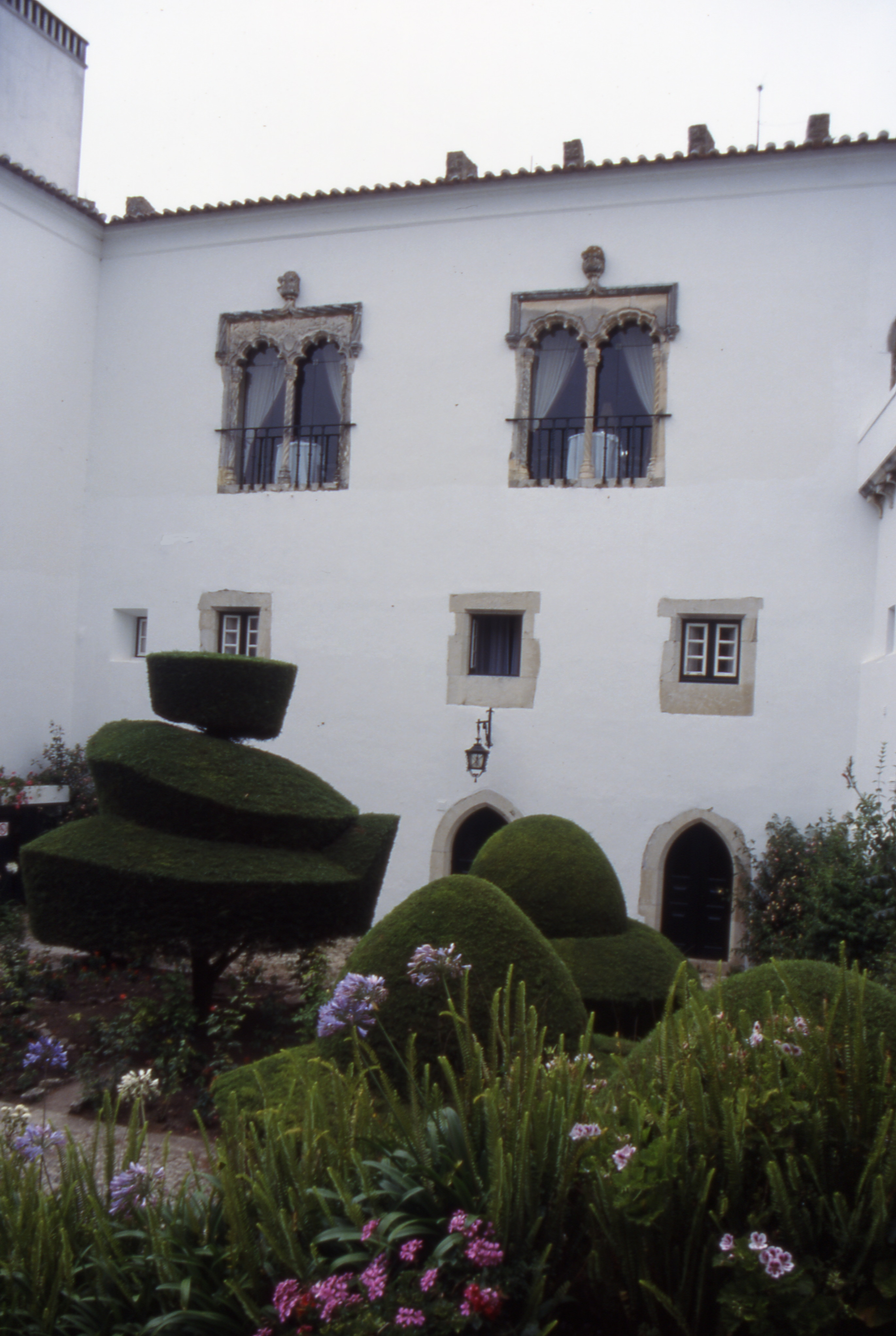 PousadaDoCasteloObidosGarten